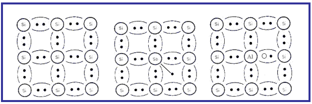 N-motako erdieroale estrintsekoa